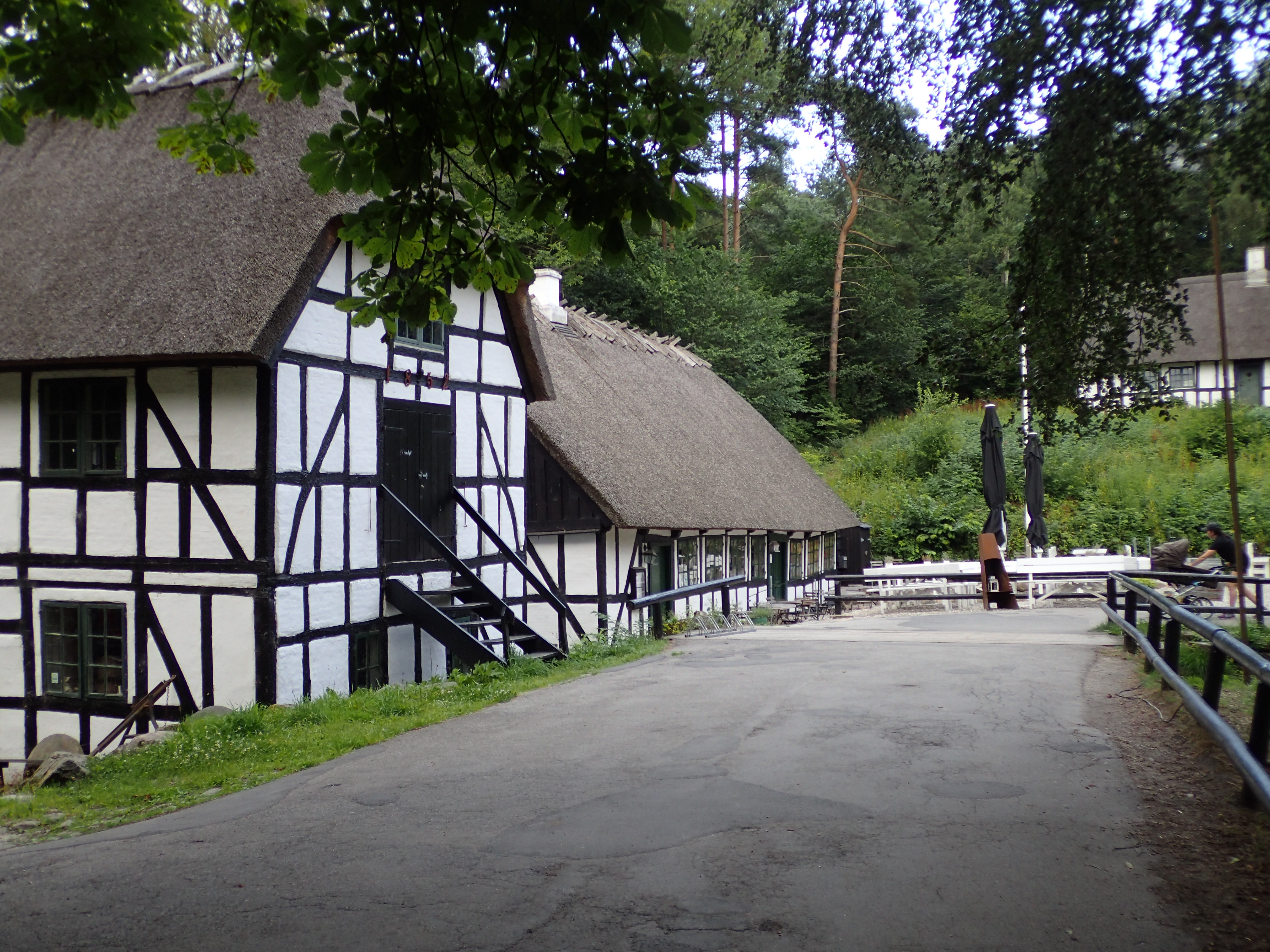 Indkørslen til Moesgård Skovmølle i Moesgård Skov.